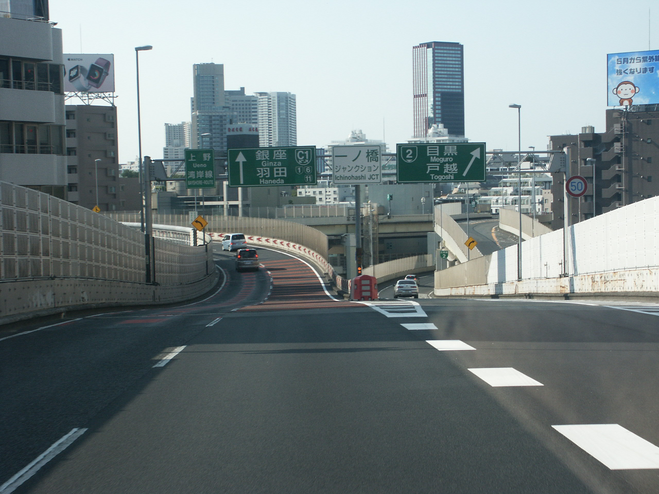 首都高速都心環状線一ノ橋ジャンクション内回り側分岐付近